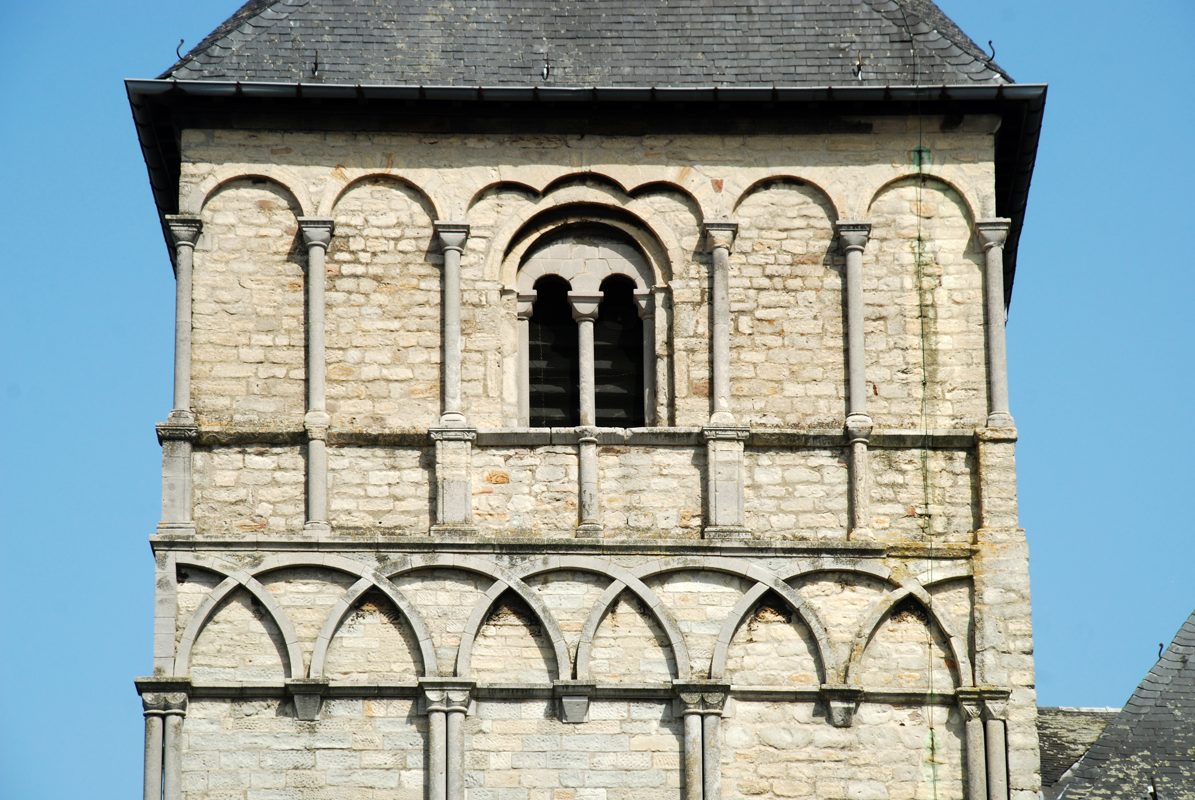 Belgique - Brabant flamand - Église Notre-Dame de Herent